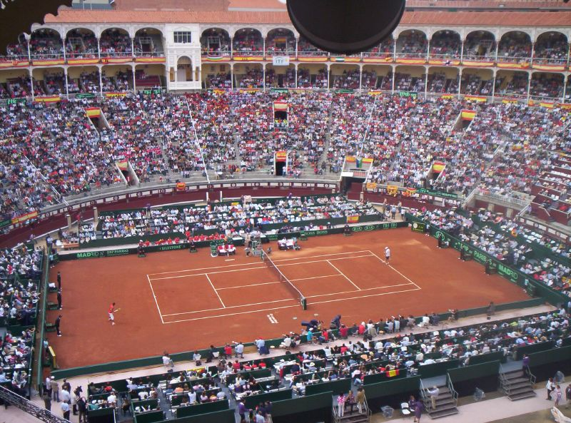 Semifinal Copa Davis '08 - Las Ventas